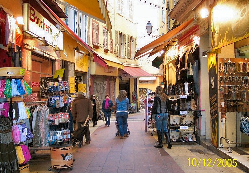 Rue Païrolière (Nice)